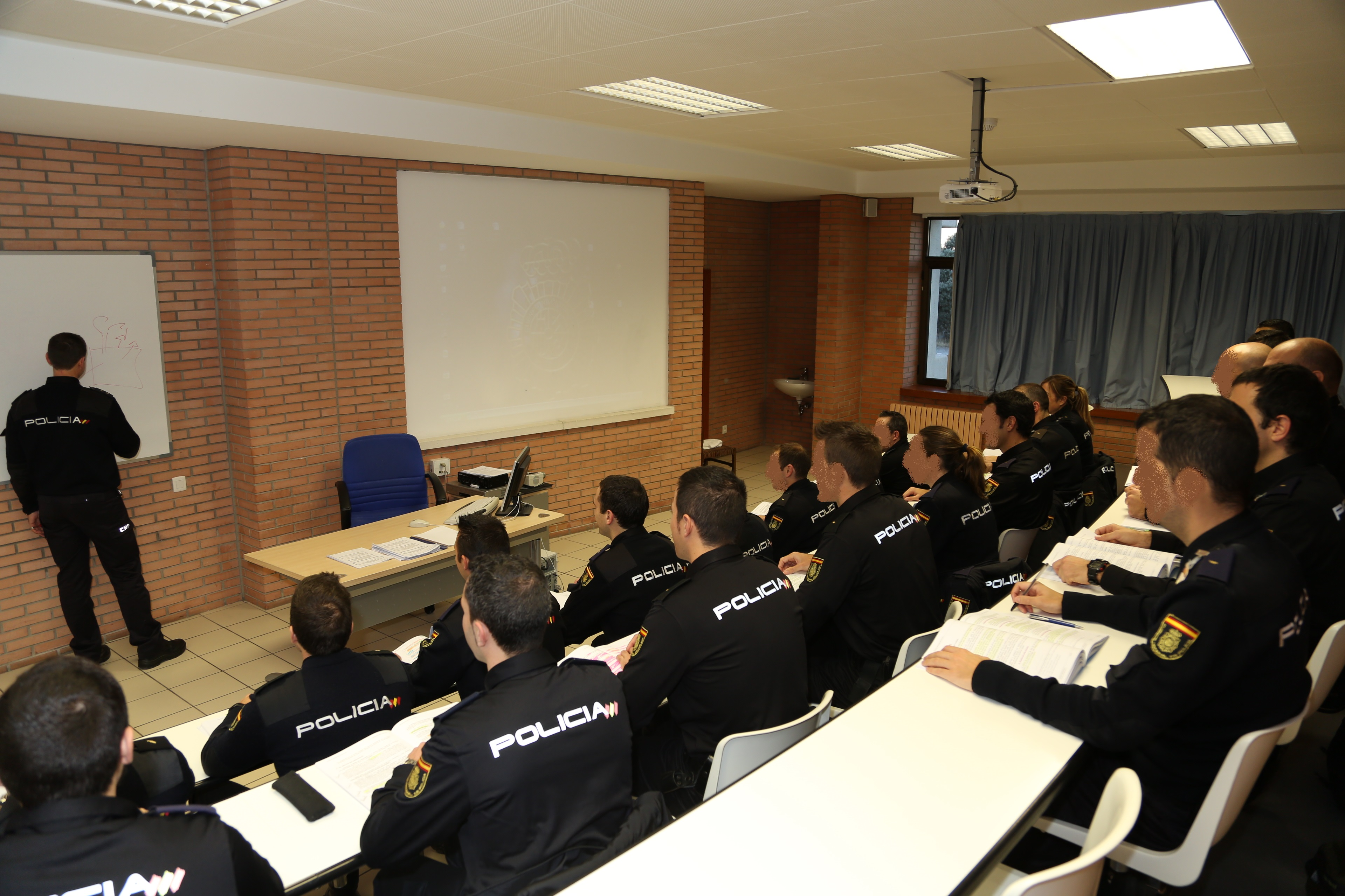 Interior de clase